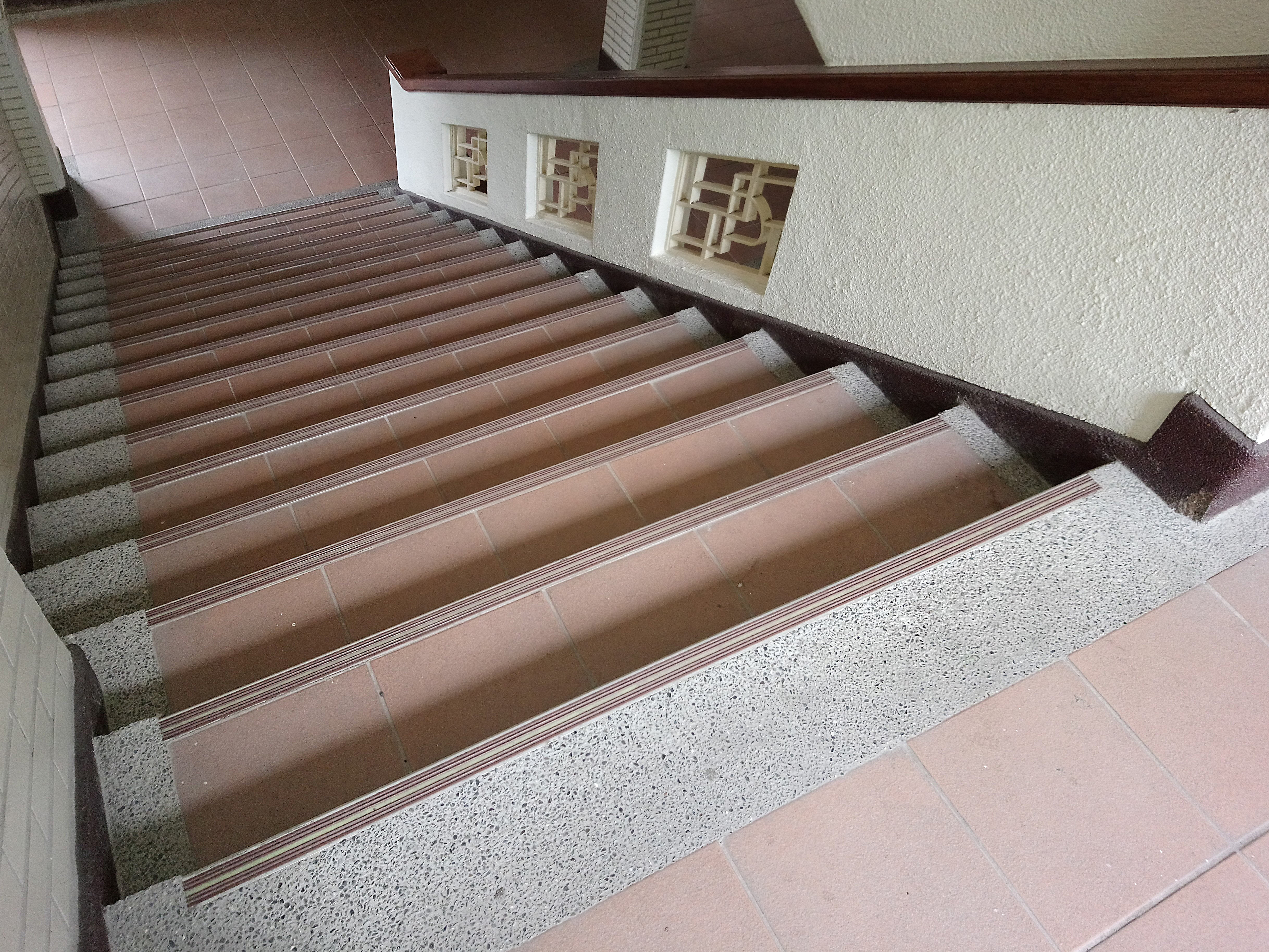 臺北市立中山女子高級中學逸仙樓樓梯,臺北市中山區朱厝崙次分區力行里